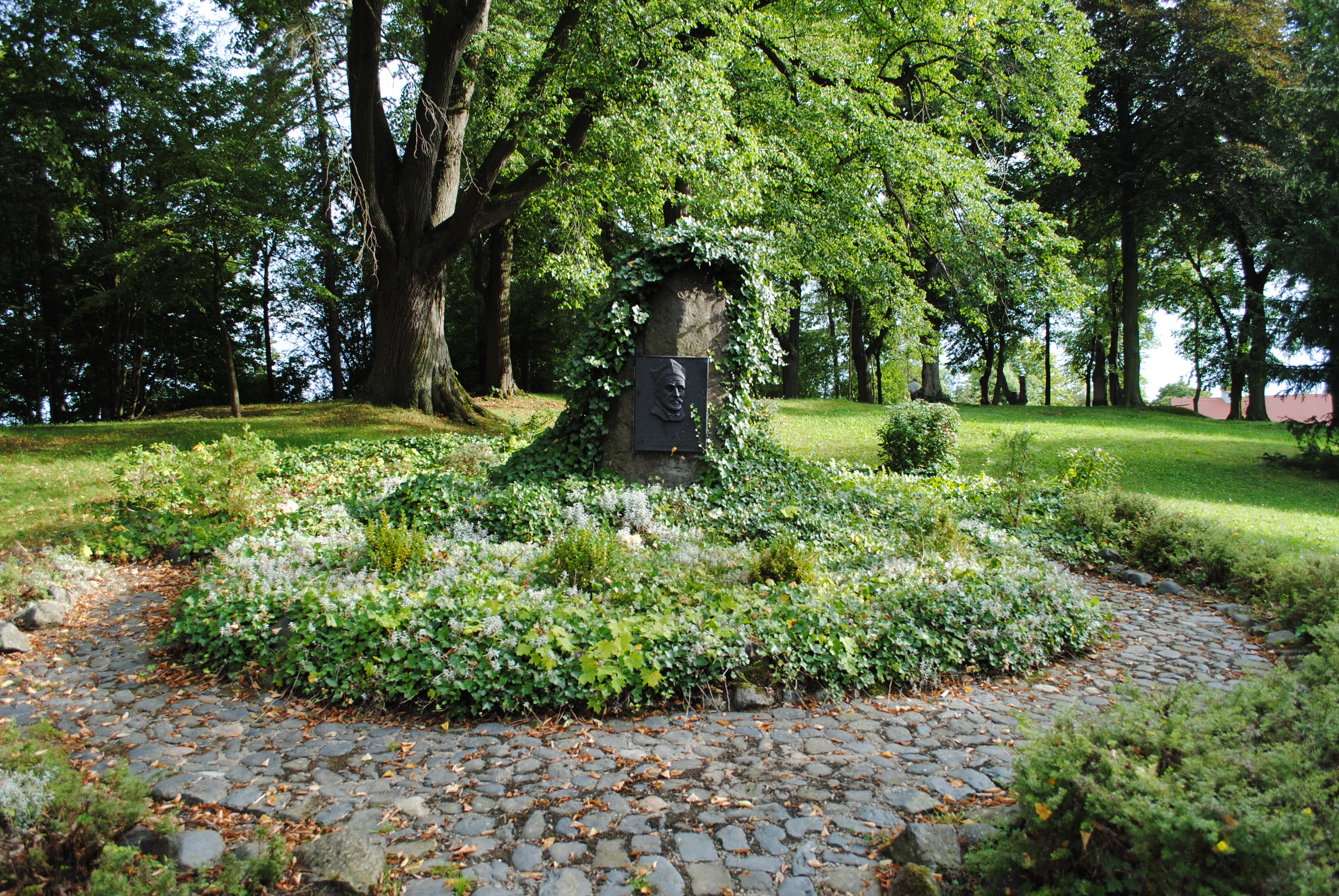 Denkmal von Athanasius Kircher, geboren 1602 in Geisa, Universalgelehrter, beschäftigte sich mit Mathematik, Physik, Chemie, Geographie, Geologie, Astronomie, Biologie, Medizin, Musik, Sprachen, Philologie und Geschichte. Ebnete mit seinen Forschungen über die Hieroglyphen den Weg ihrer Entschlüsselung ...